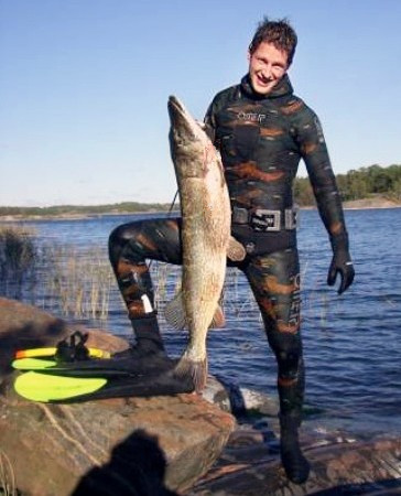 Sukelluskalastus Makeanveden Hauki